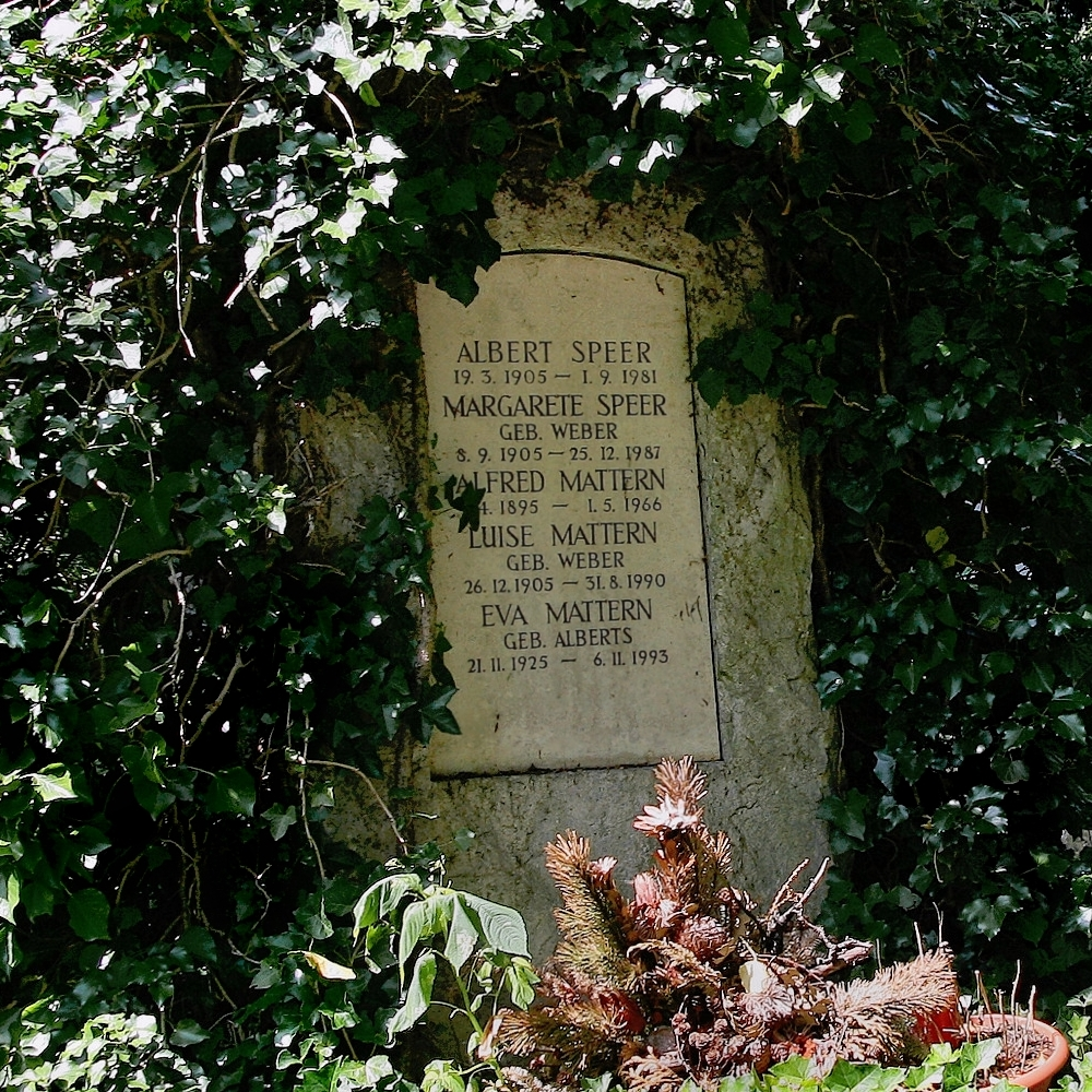 Grab von Albert Speer auf dem Bergfriedhof in Heidelberg